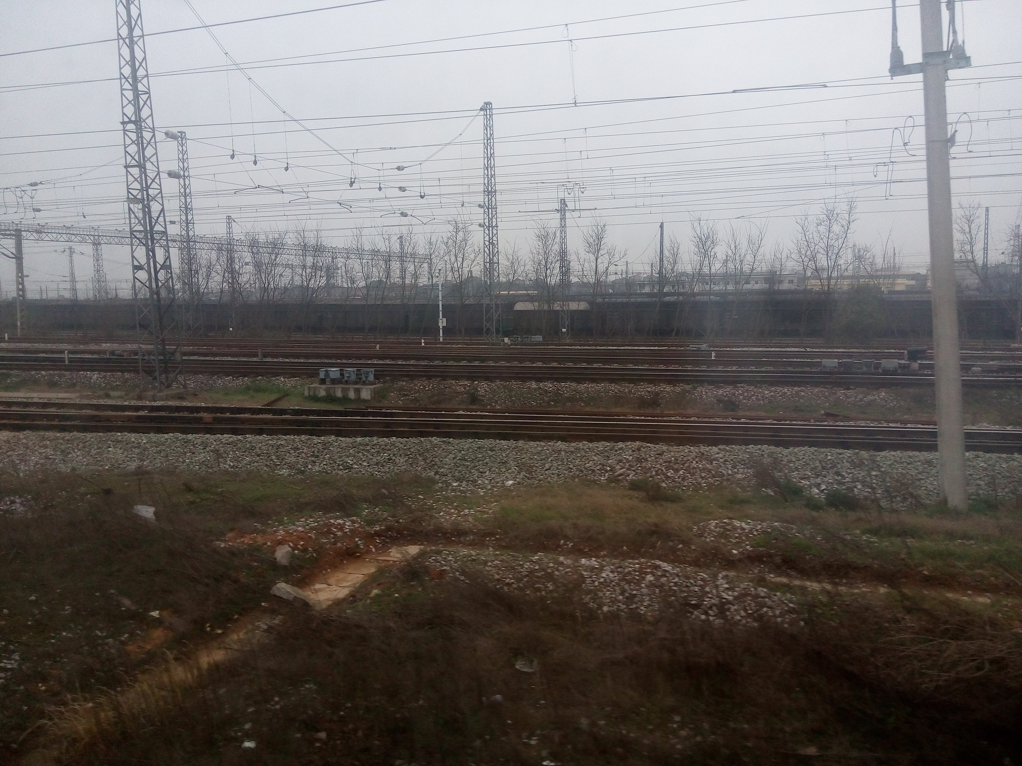 从驶向抚州（图左）的列车拍摄的向塘西站站场